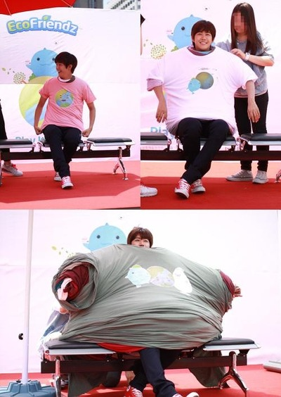 광희 기네스북